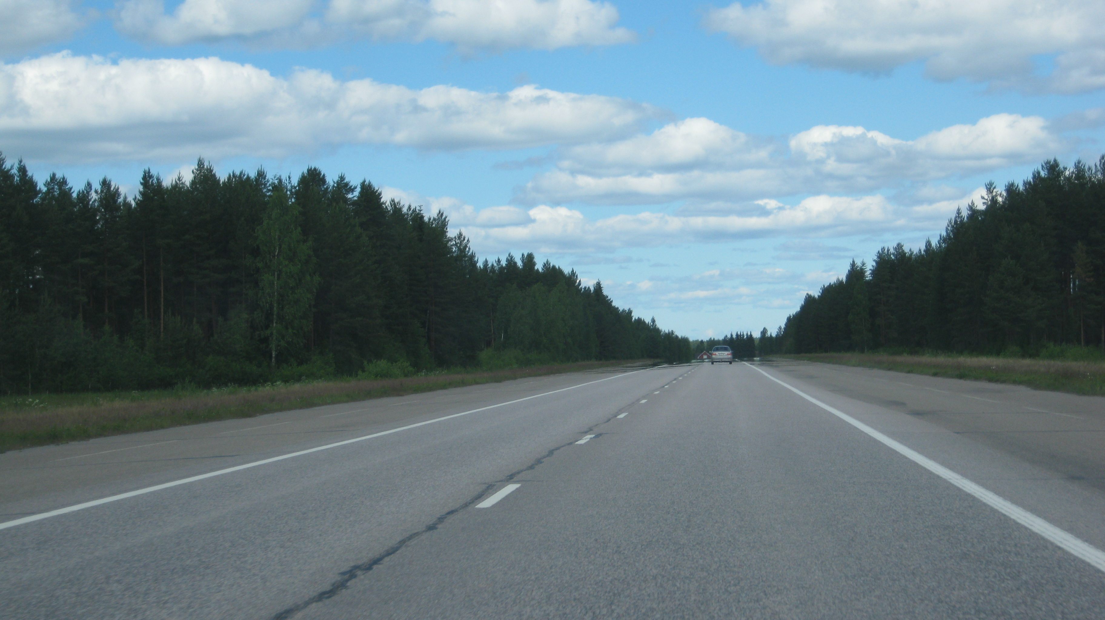 Lentokoneiden varalaskupaikka kantatiellä 66 Alavuden ja Kuortaneen rajalla.